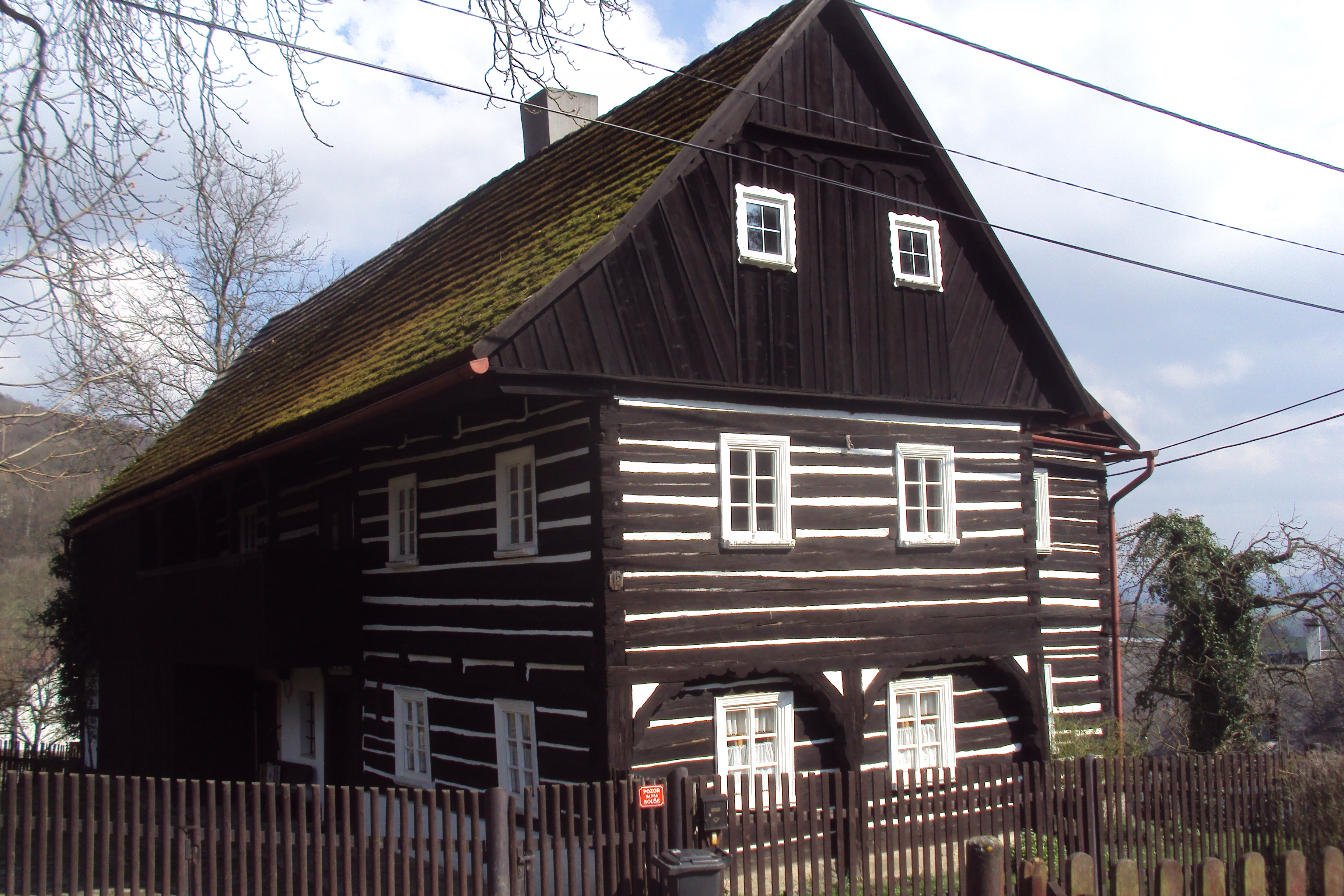 Stavení 12 v obci Slunečná na Českolipsku